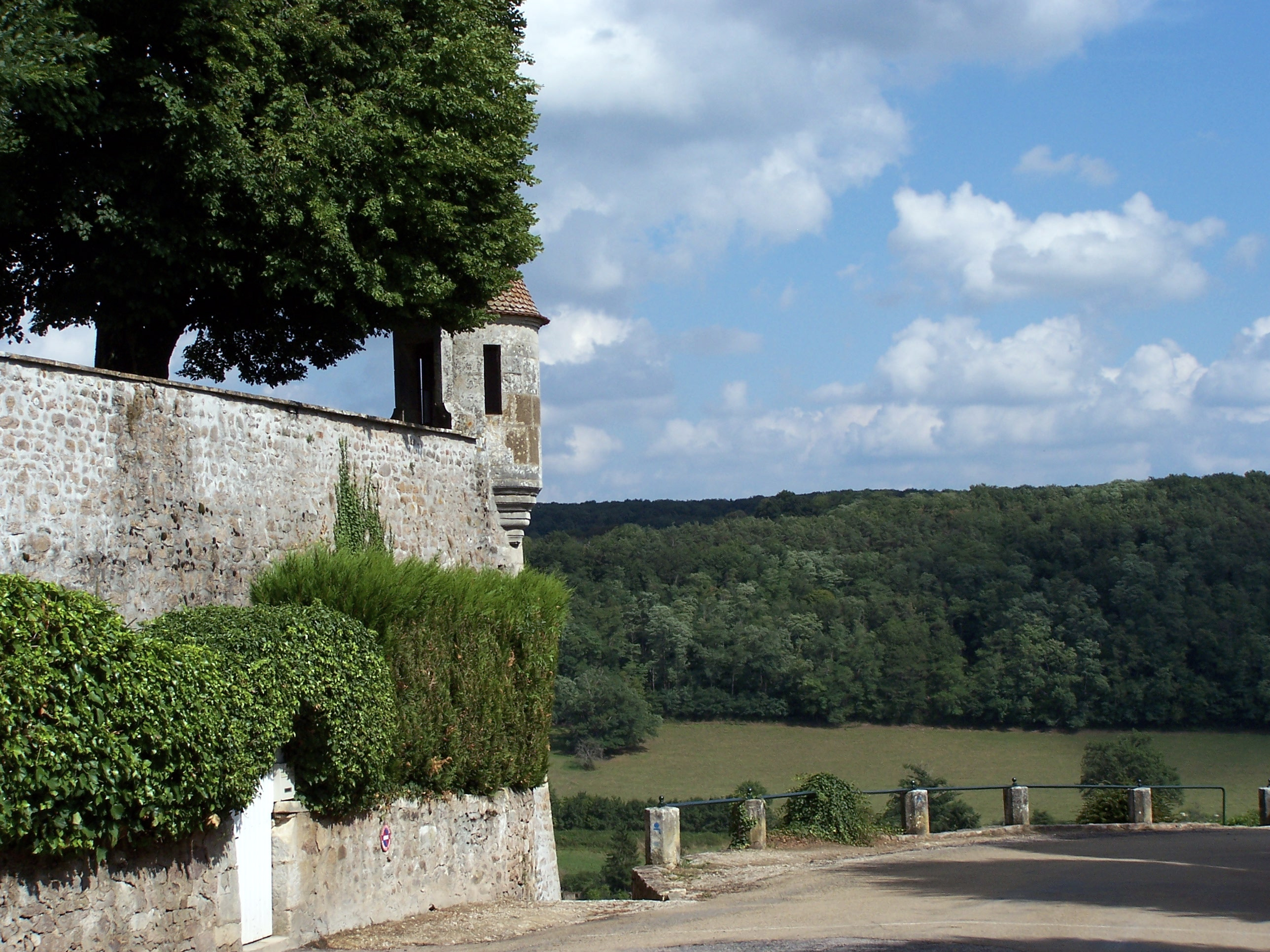 Avallon dans l'Yonne (bastion de la petite porte, 1590) Août 2006